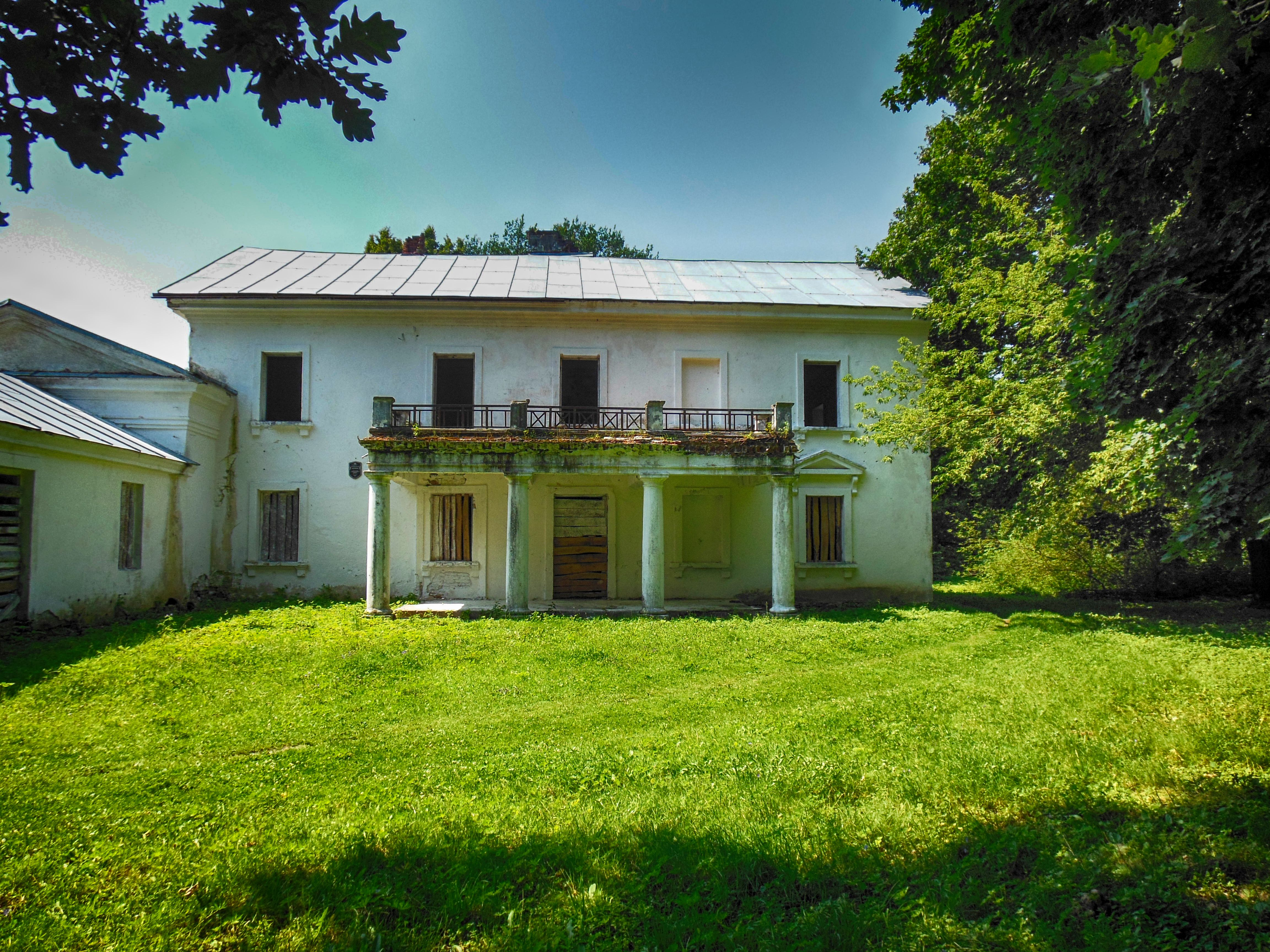 Беларуская (тарашкевіца): Фрагмэнты ансамбля былога палаца Храптовічаў:флігельвяндлярняпаркбібліятэка. в. Шчорсы This is a photo of Belarusian heritage monument. Reference number: 412Г000467 ( WLM)